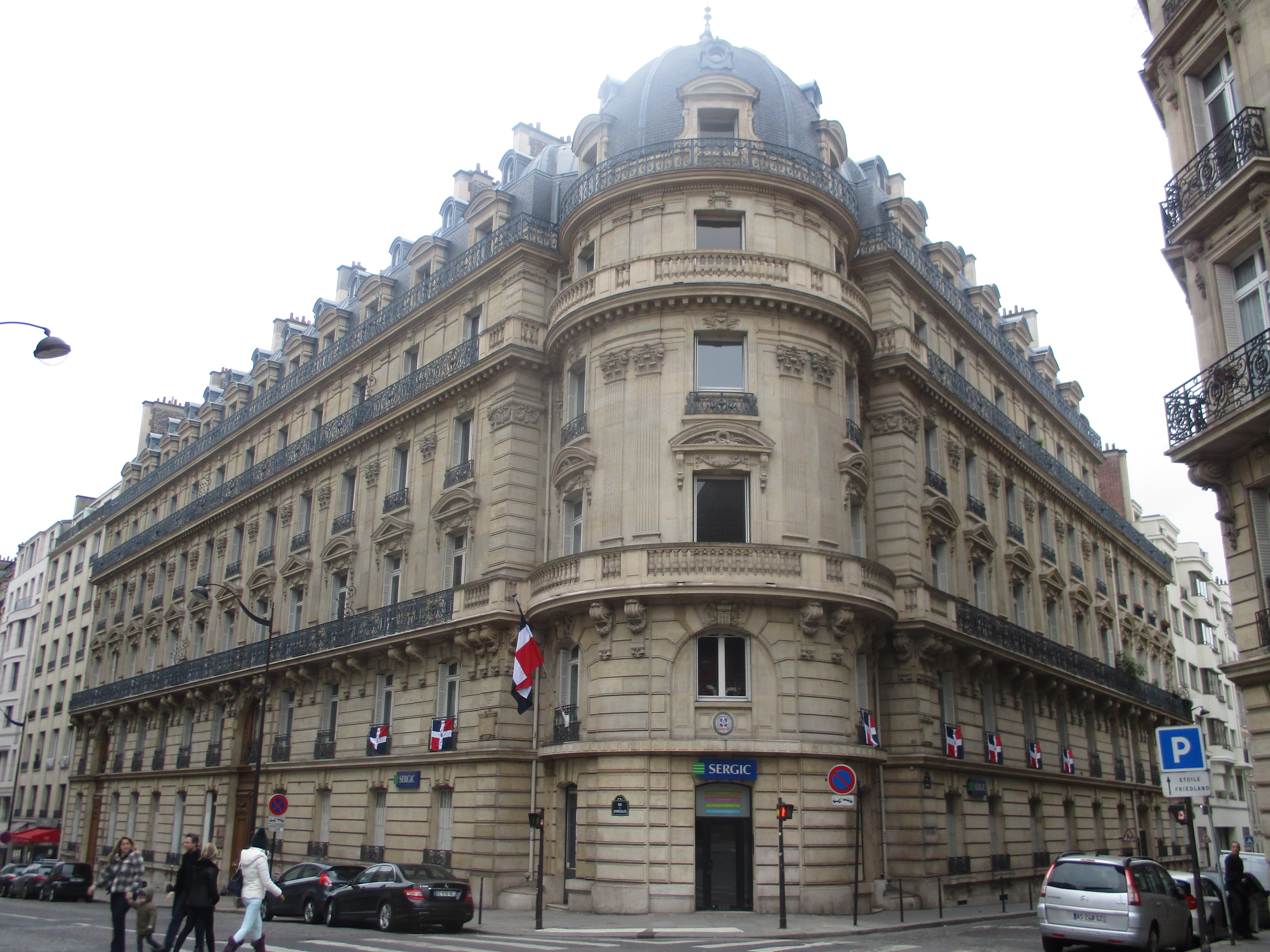 Paris VIIIe ː immeuble du 45 rue de Courcelles construit par Alfred Fasquelle en 1881.